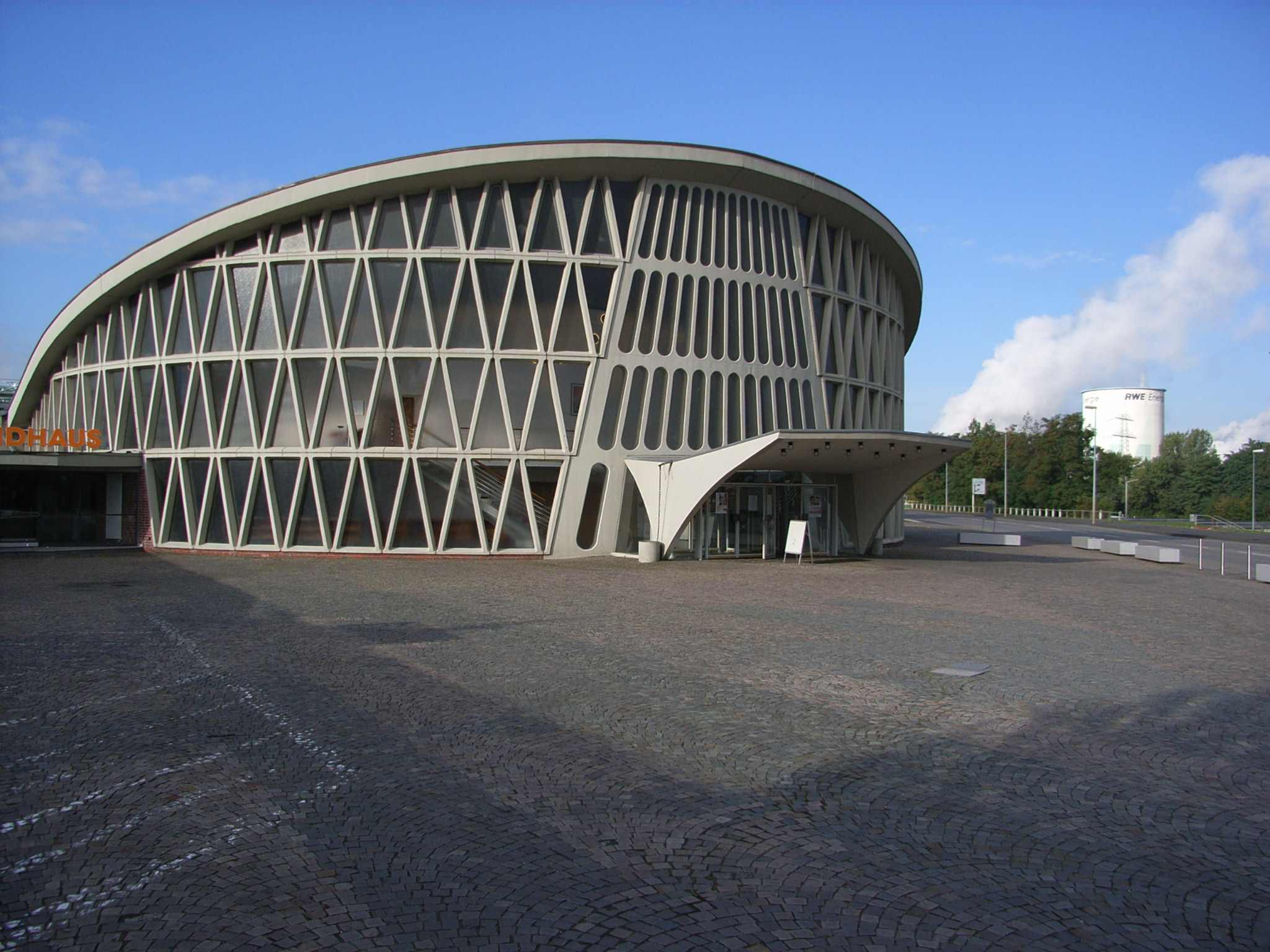 Feierabendhaus, Chemiepark Knapsack, Hürth-Knapsack